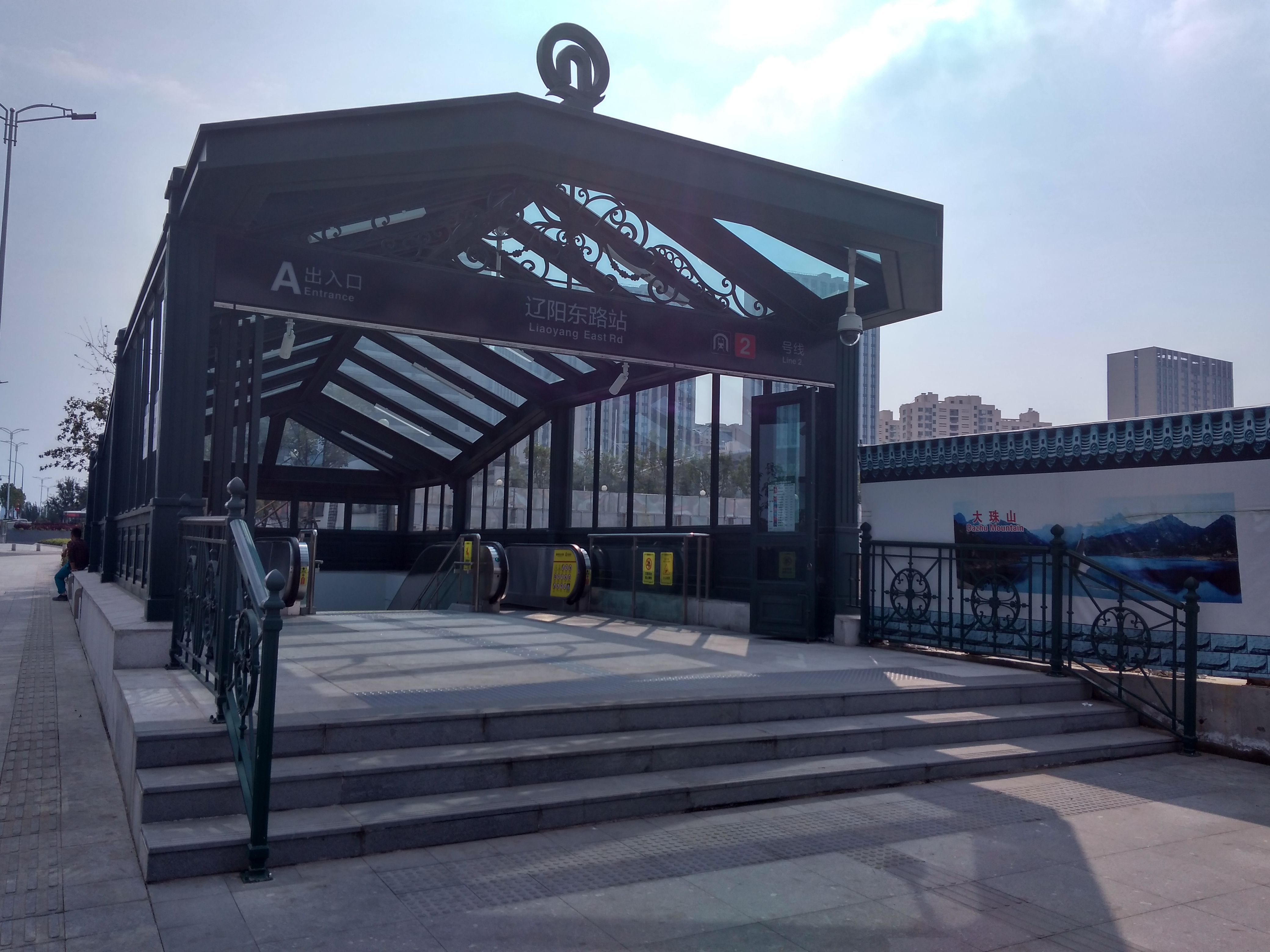 辽阳东路站A口